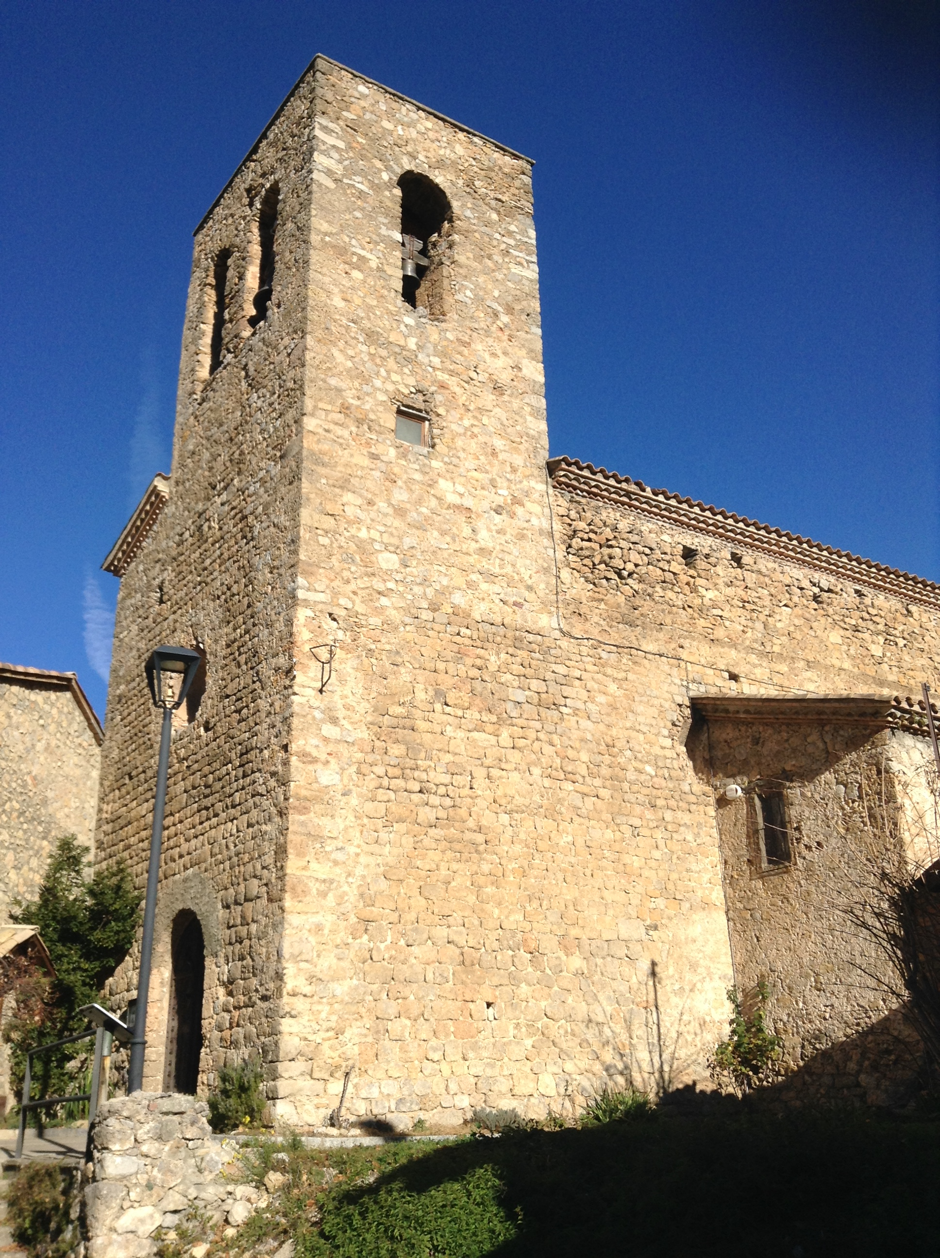 Església parroquial de Sant Esteve de Tuixent. Desembre de 2016.